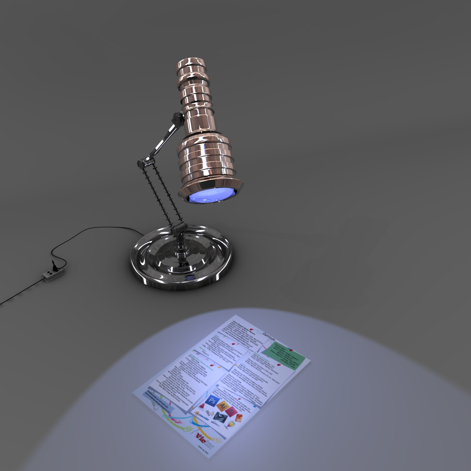 Abajurr Luneta trabalho de victor moreira